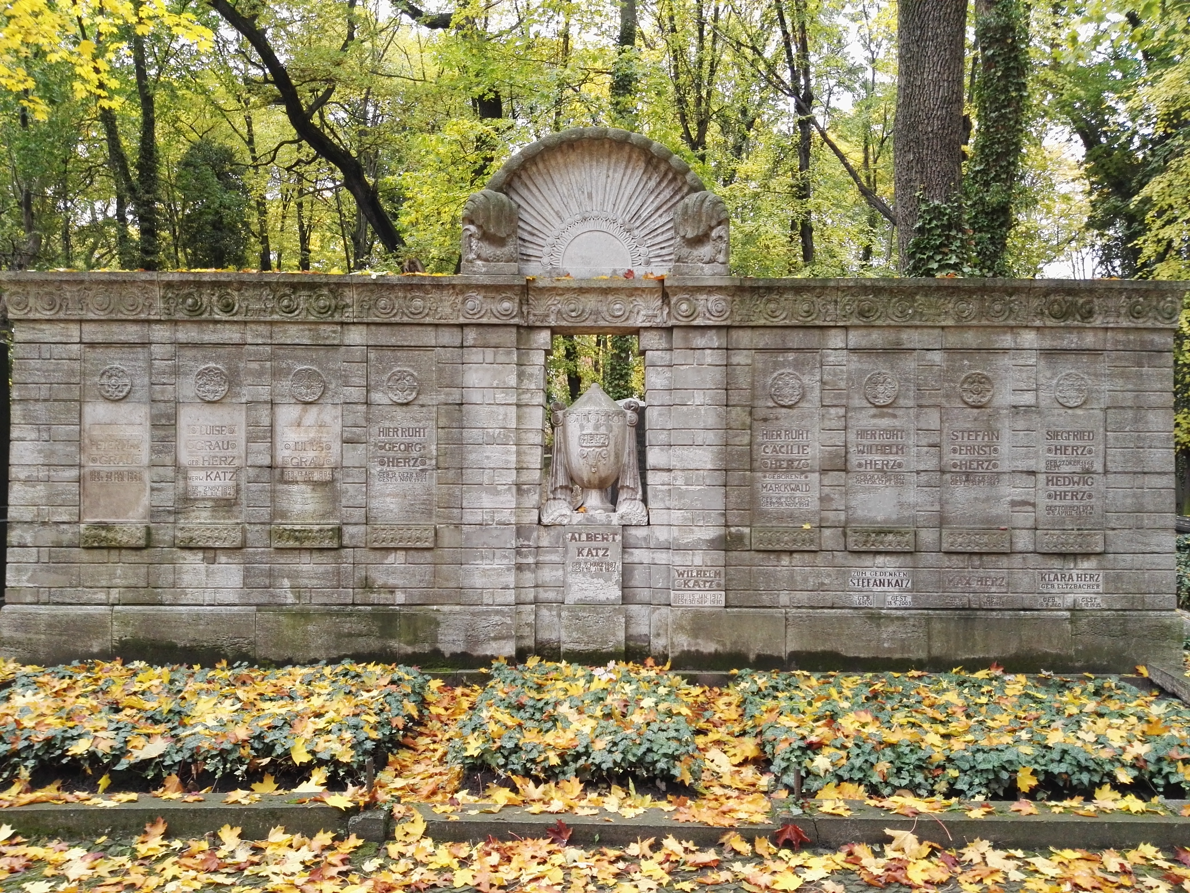 Grabstätte der Familie Herz auf dem Jüdischen Friedhof Schönhauser Allee in Berlin; drittes Grab von rechts Wilhelm Herz (Ehrengrab)